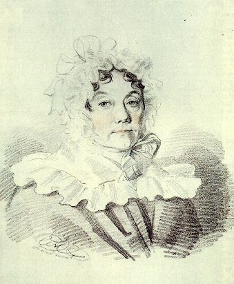 Мария Ивановна Римская-Корсакова, ур. Наумова (1764 или 1765—1832) — вдова камергера Александра Яковлевича Римского-Корсакова (ум. 1814 или 1815).